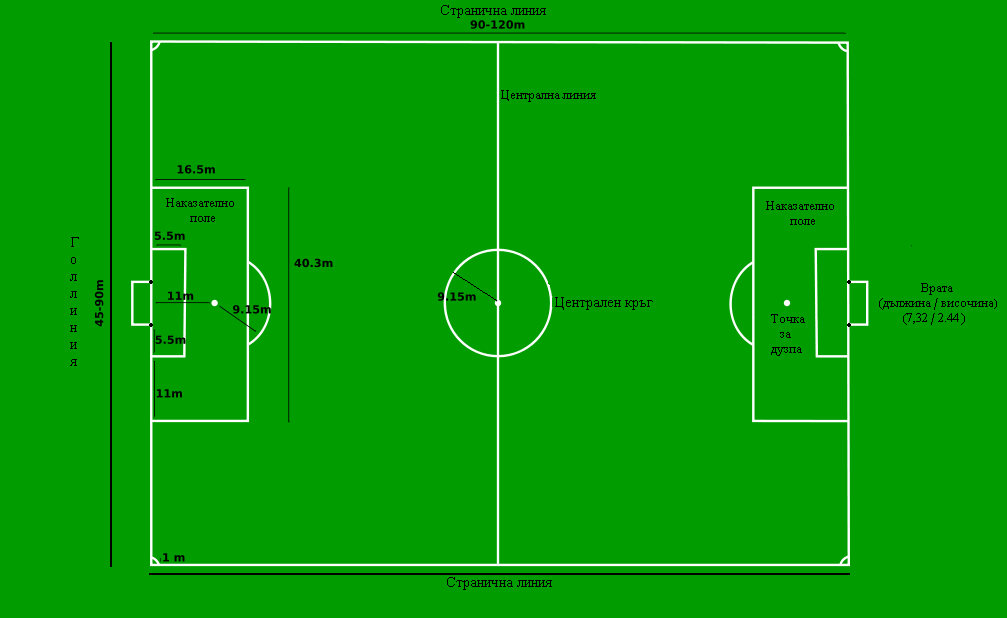 Това е схема на футболно игрище с означения на български език. Представя устройството на един футболен терен и дава информация за неговте стандартни размери.